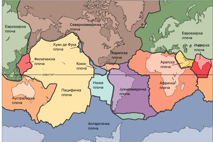 Zemljine tektonske ploče Preveo piši mi 5п Jefe 20:43, 12. август 2007. (CEST) Izvor Wikimedia commons Licensing